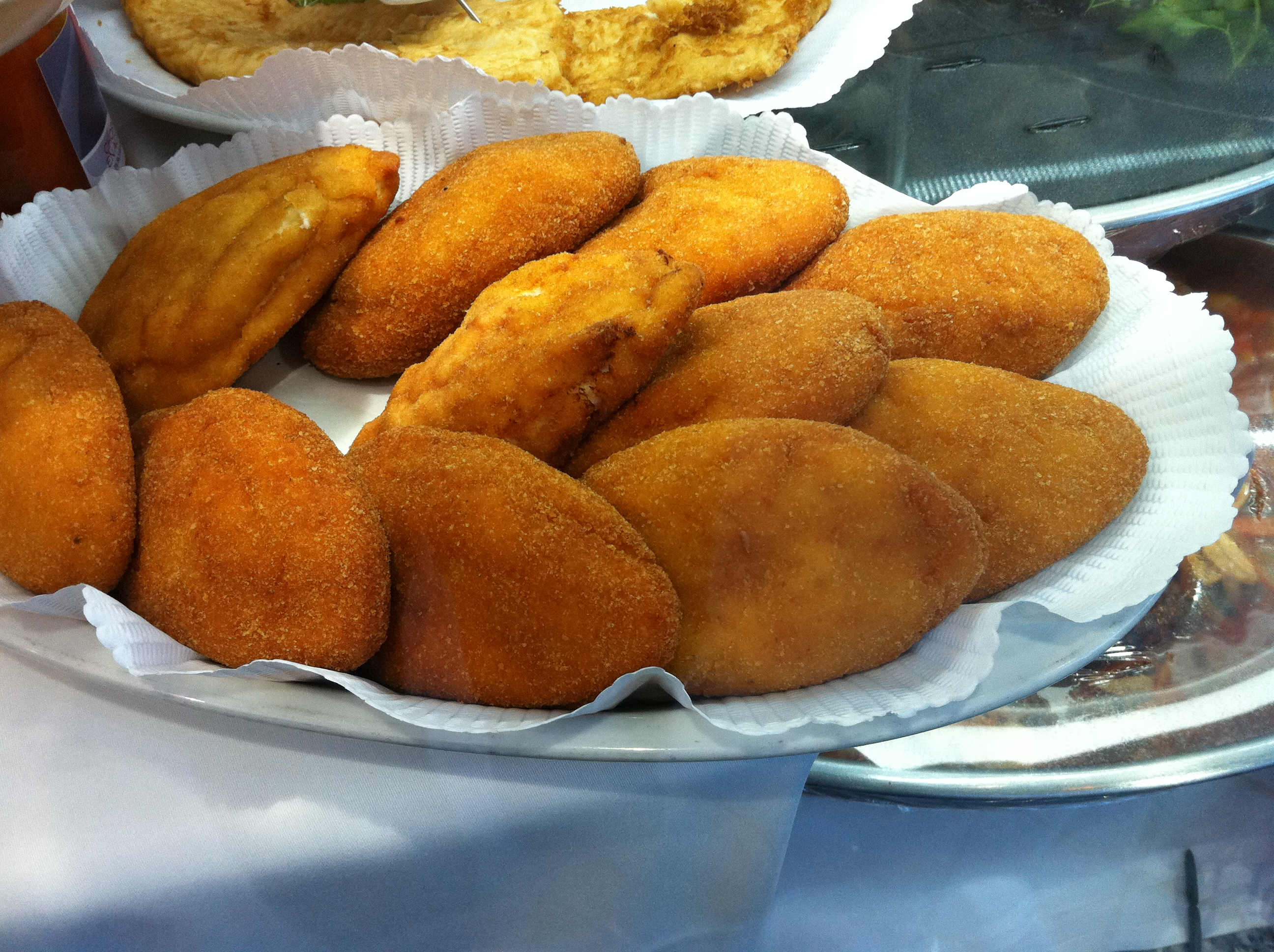 Pechugas de pollo a la Villaroy